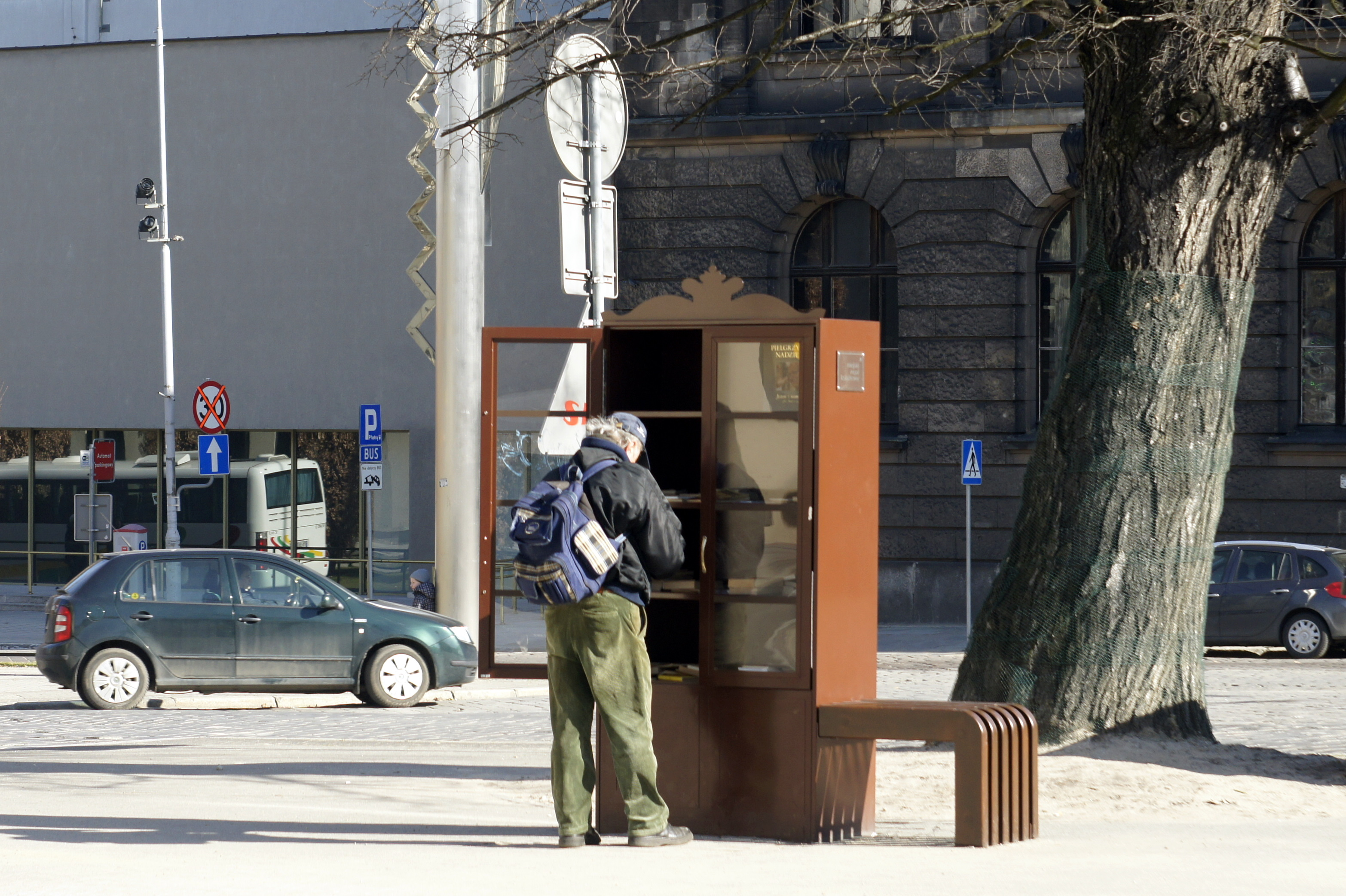 Bookcrossing, wypożyczanie książek poprzez uliczne regały, bez bibliotecznych formalności ( Poznań, Plac Wolności w marcu 2013 r.)